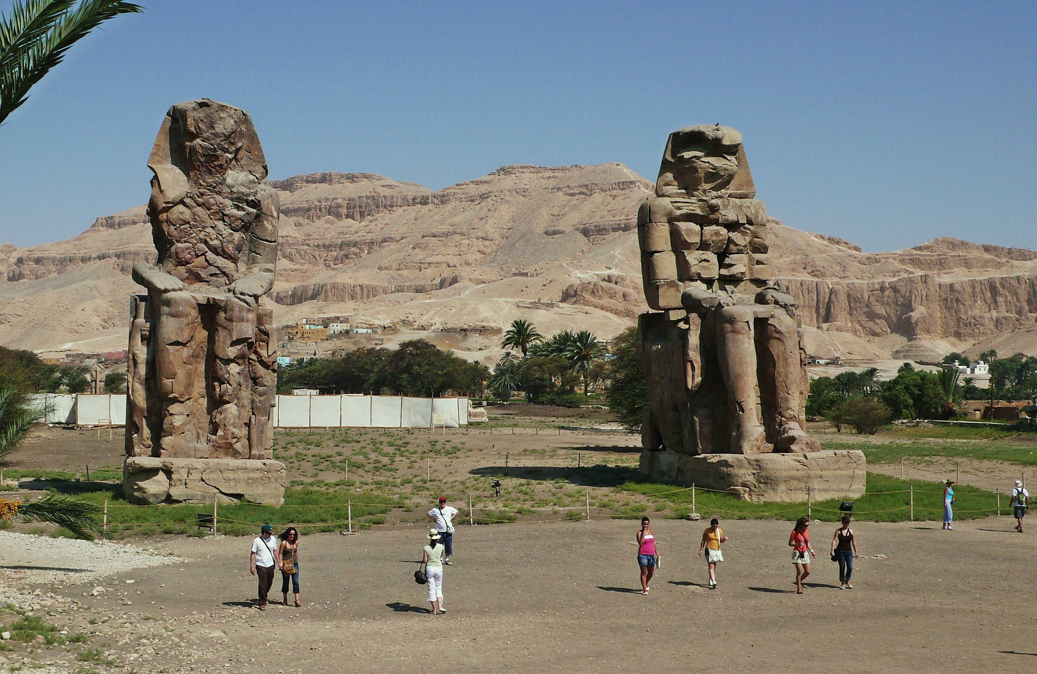 egipto